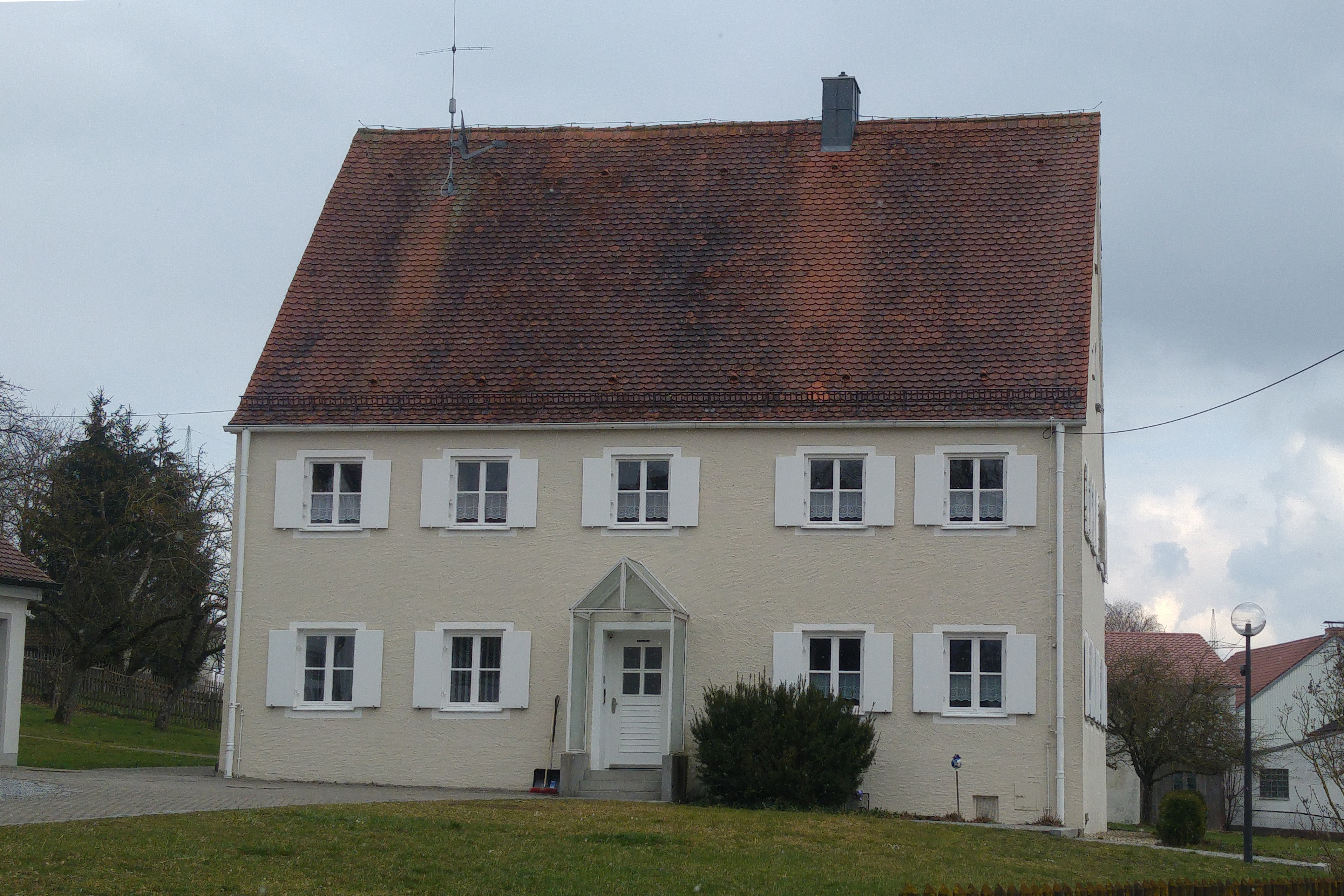 Baudenkmäler in Hollenbach, Aktennr. D-7-71-140-3